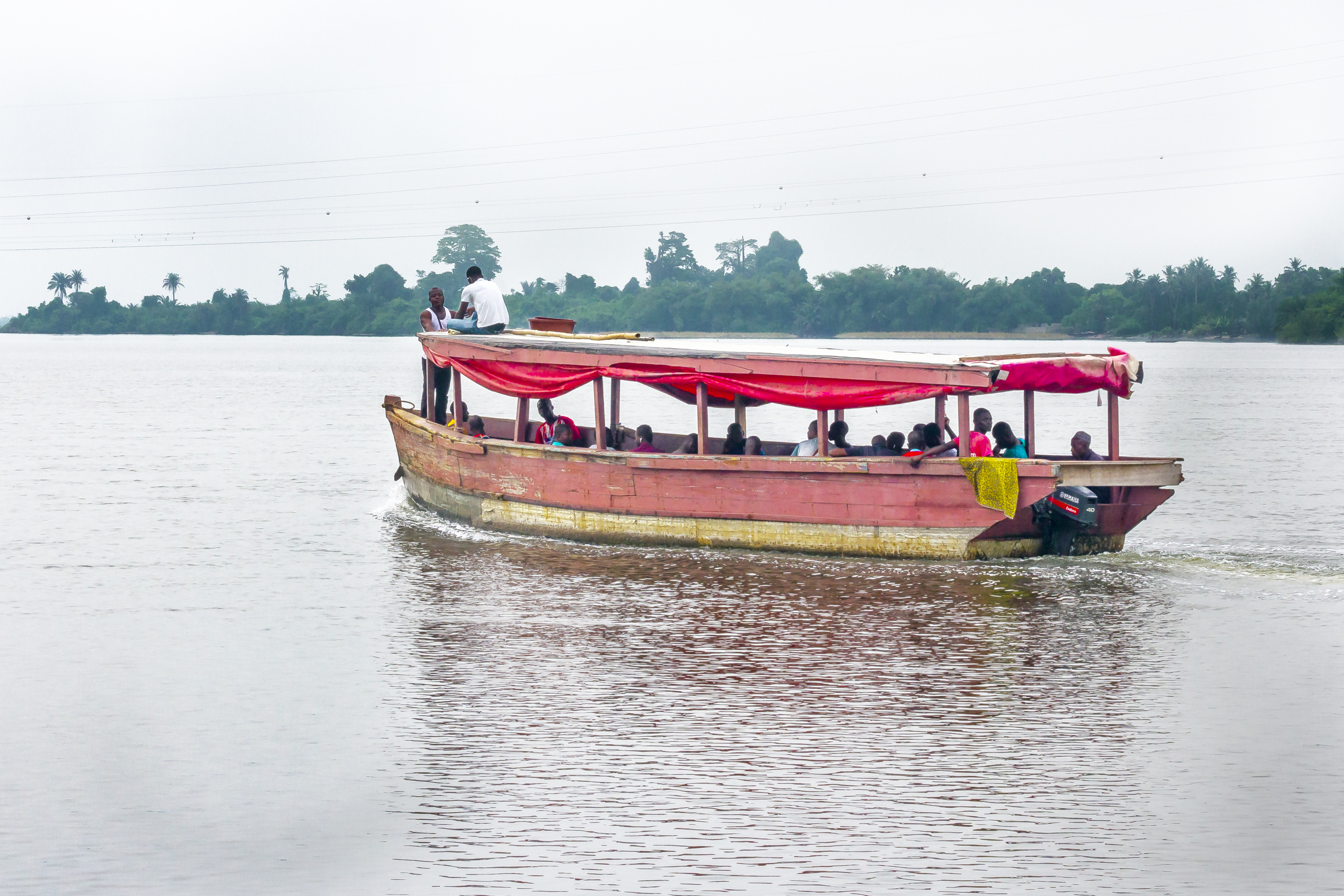 Une pinasse reliant Cocody à Koumassi à Abidjan, en Côte d'Ivoire This is an image with the theme "Africa on the Move or Transport" from: Ivory Coast